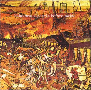 Plattencover Balaklava von Pearls Before Swine